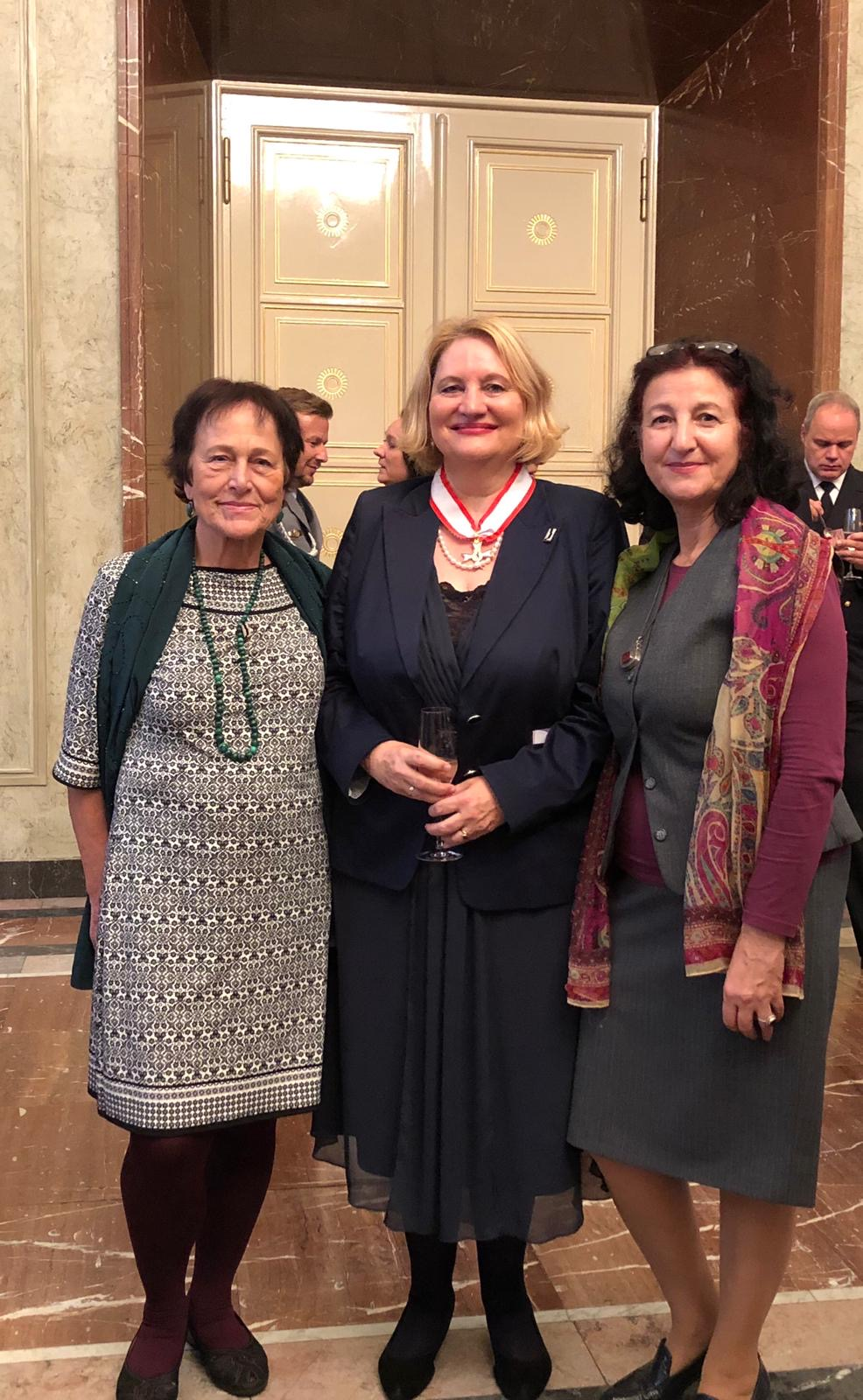 Christa Stolle gemeinsam mit Vorstandskolleginnen bei der Verleihung des Verdienstorden des Landes Berlin (2019)